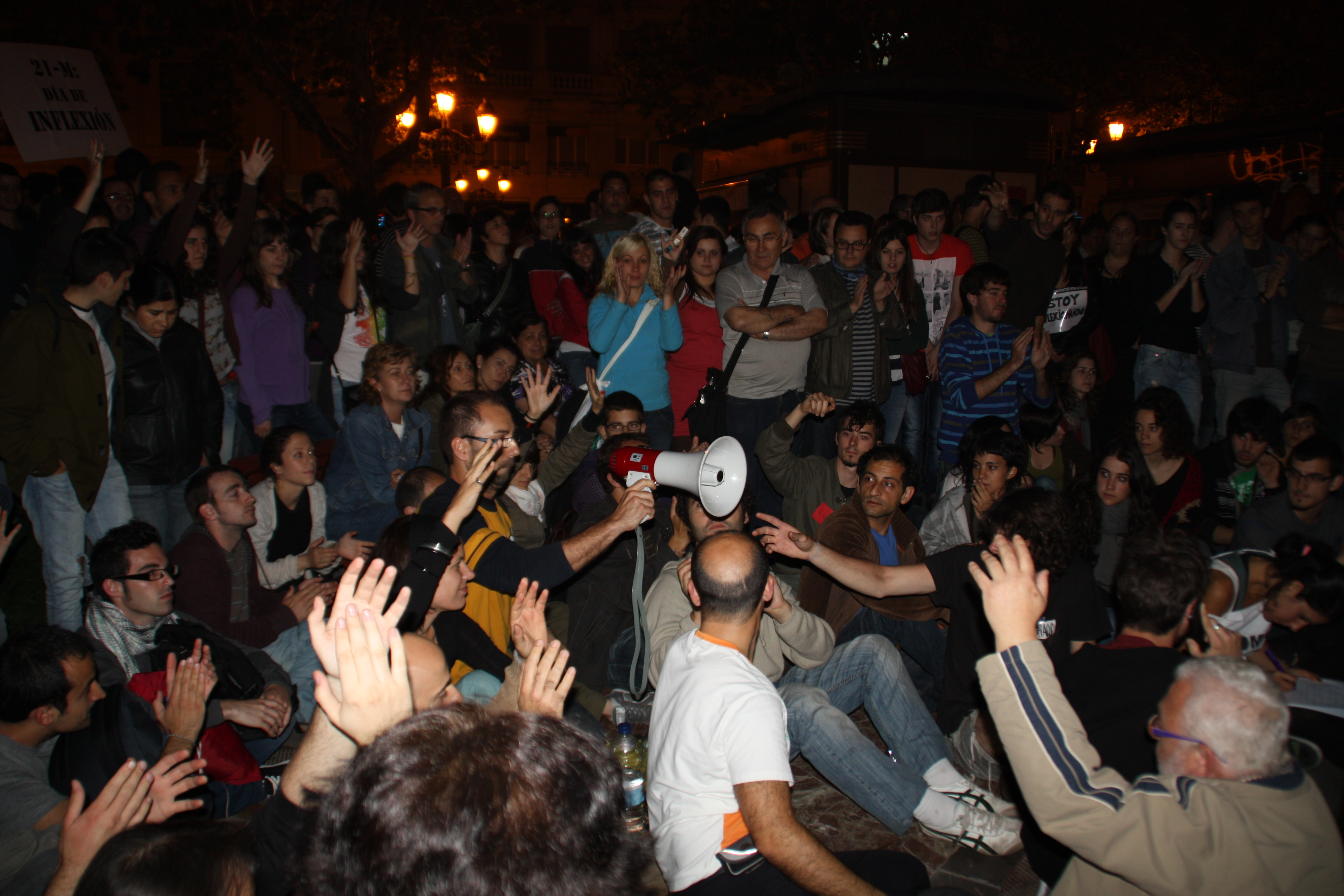 Reunión para el Grupo de Acciones del movimiento Democracia Real Ya en Valencia. Para pedir la palabra, levantaban la mano. Para aplaudir usaban el lenguaje de signos para poderse escuchar unos a otros sin interrupción. La secretaria tomaba nota de todas las propuestas y al final se votaban para llevarlas a la Asamblea. Aquí se puede ver a algunas personas aplaudiendo con el lenguaje de signos y otras personas pidiendo la palabra con la mano alzada.